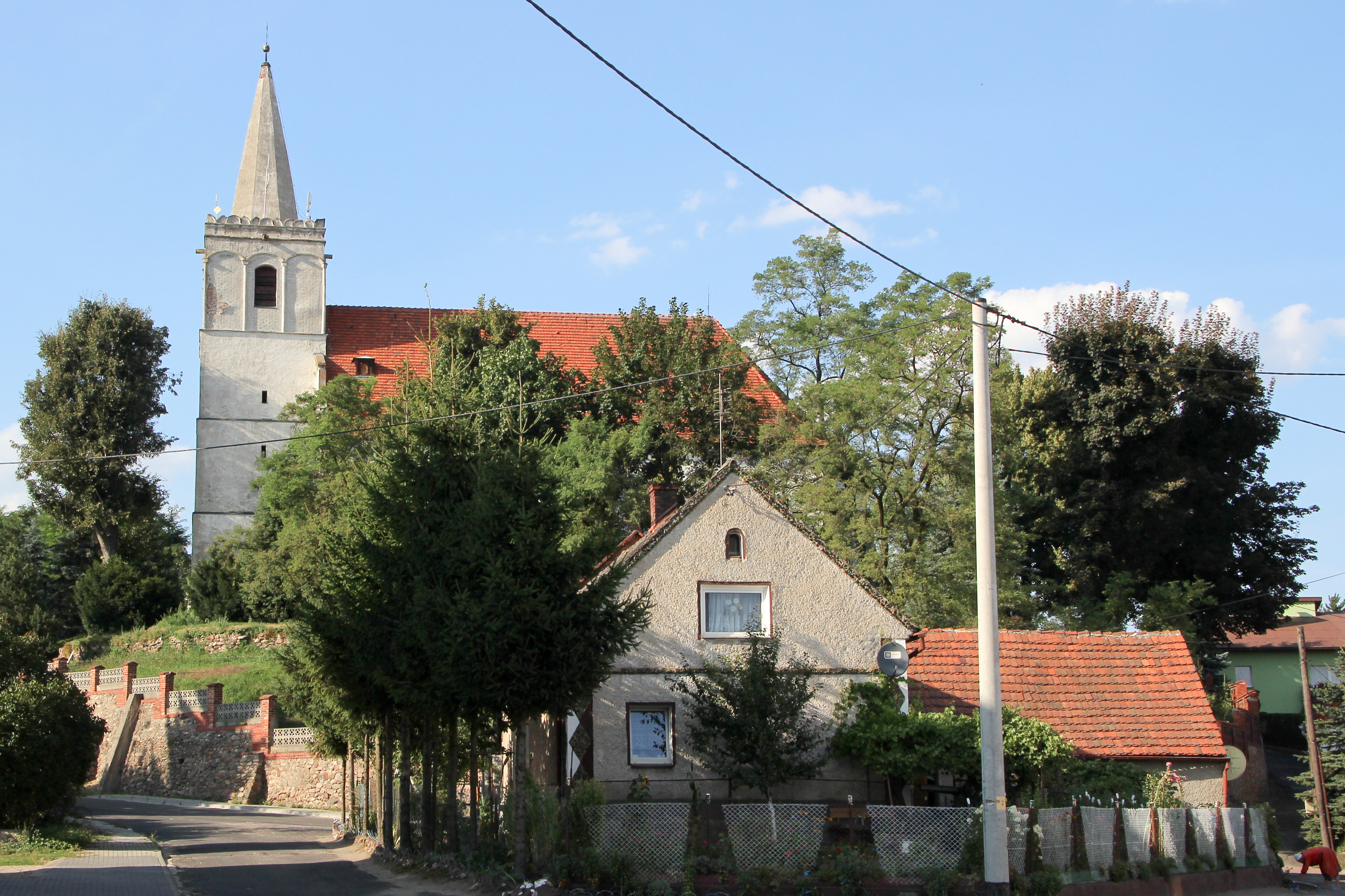 Ścinawa Nyska – zespół kościoła p.w. śś. Piotra i Pawła